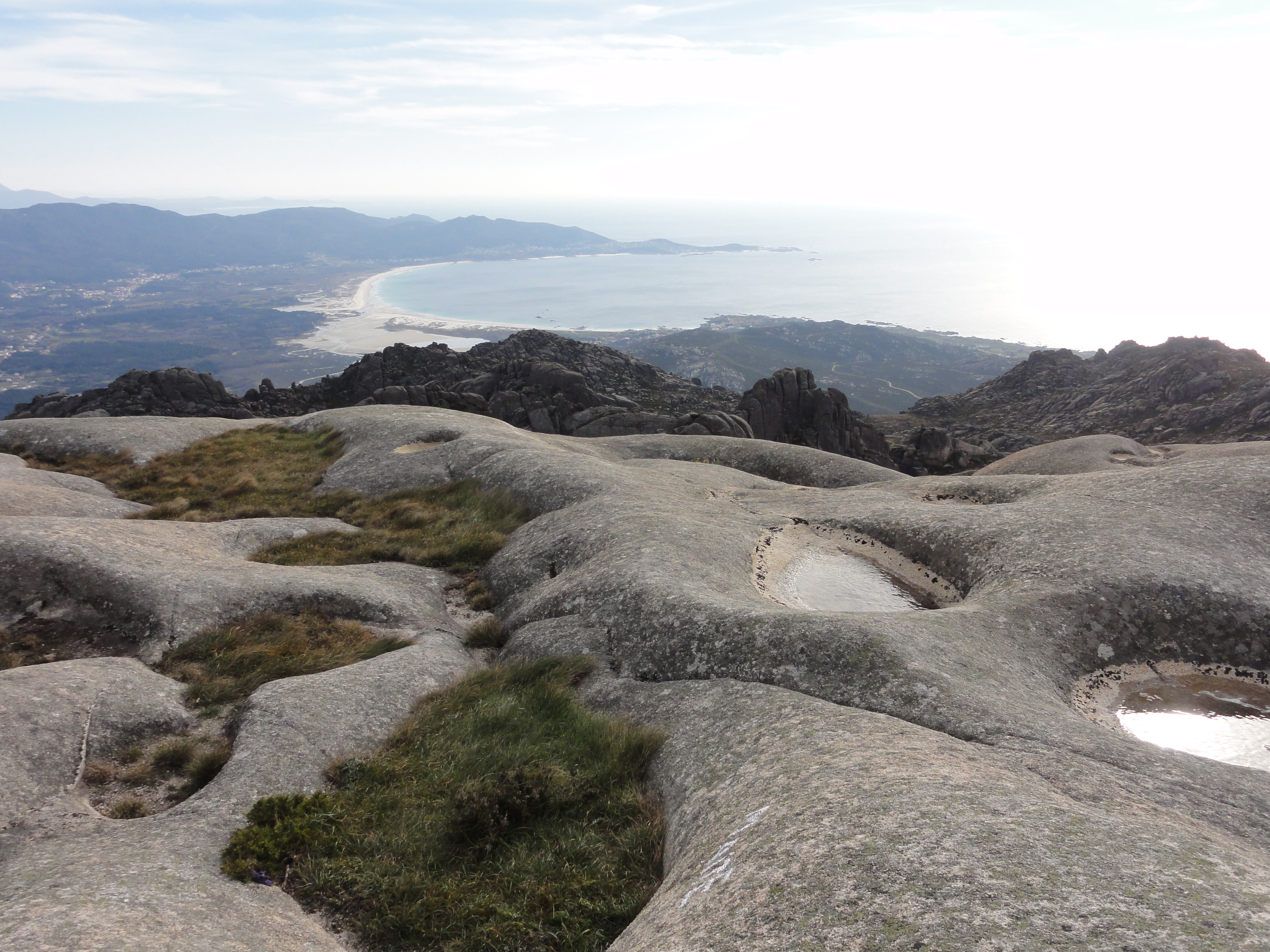 Carnota - Monte Pindo This is a photography of a Site of Community Importance in Spain with the ID: ES1110008. Natura2000 entry, EEA entry